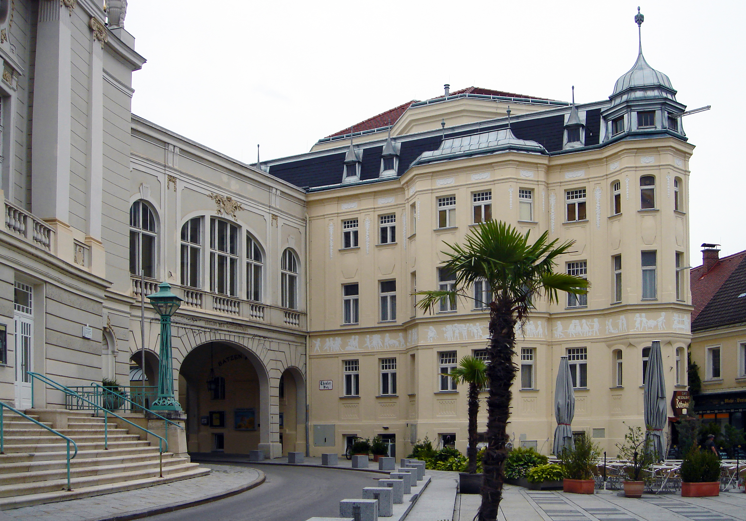 Baden bei Wien, Theaterplatz 9 (Batzenhäusel samt Übergang zum Stadttheater Baden)